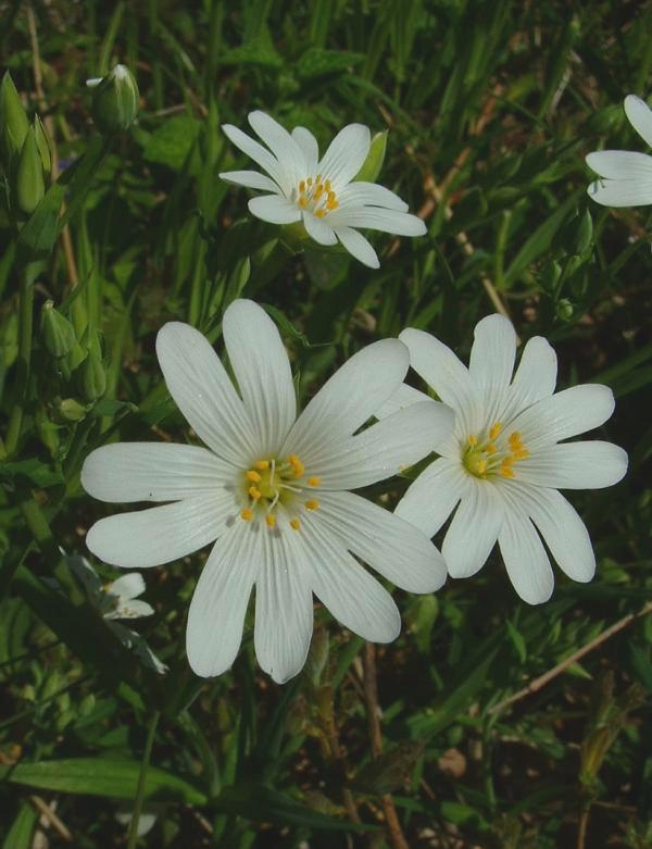 Stellaire holostée, Gy, Avril 2004